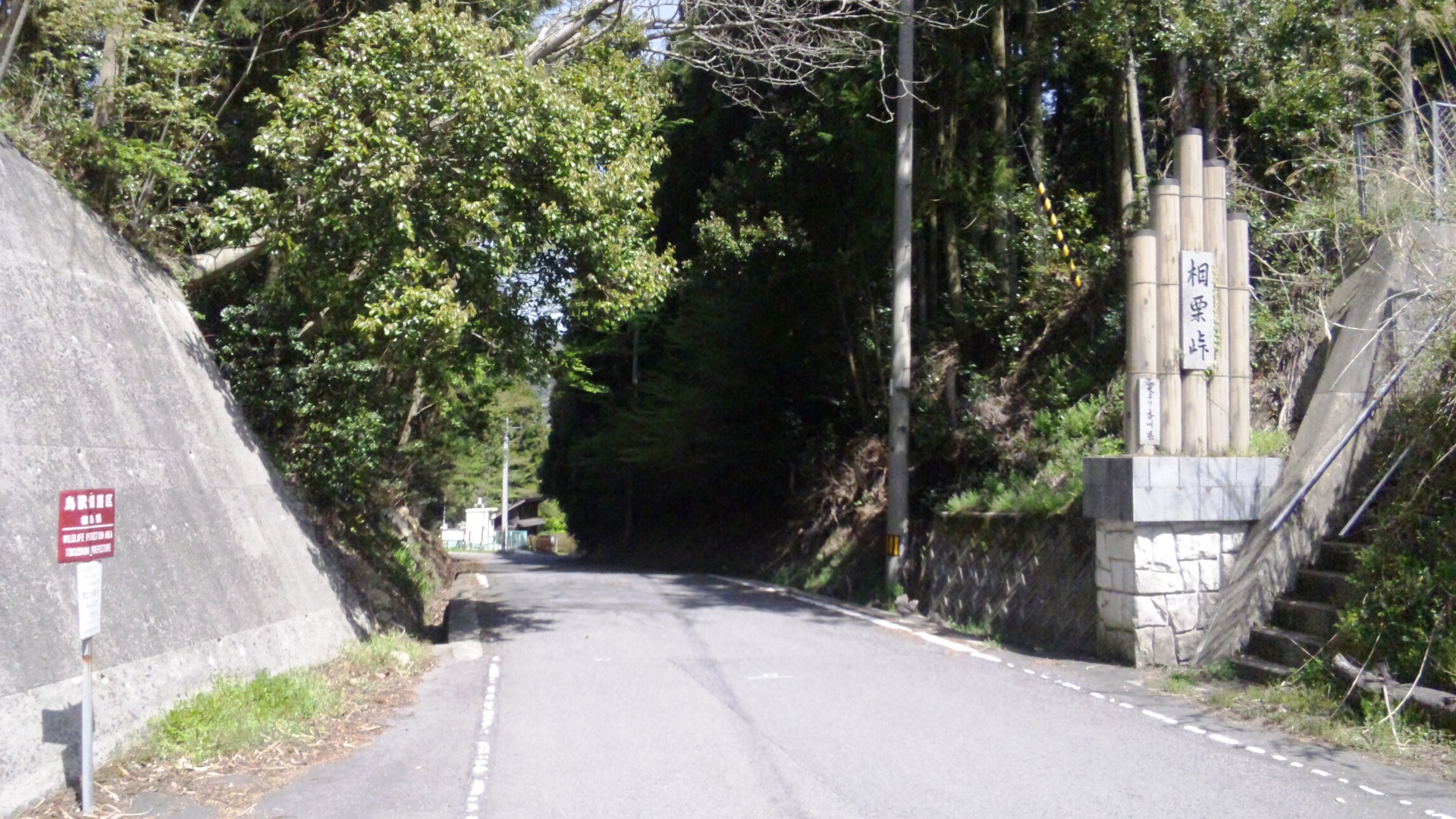 香川県と徳島県の県境にある相栗峠。